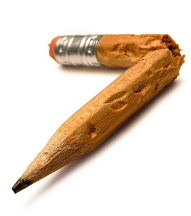 a broken pencil